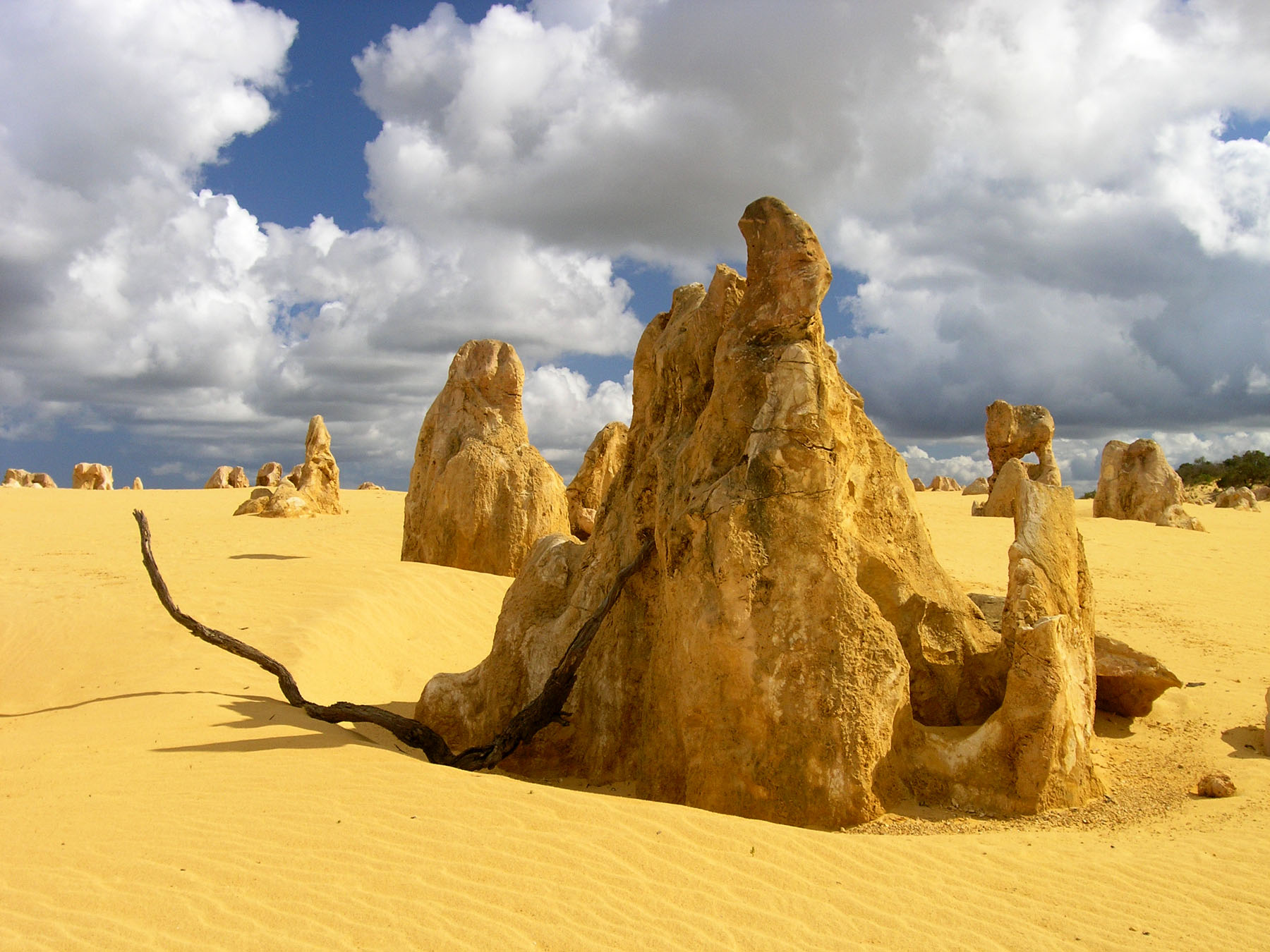 Zachodnia Australia. Pustynie Pinnacles